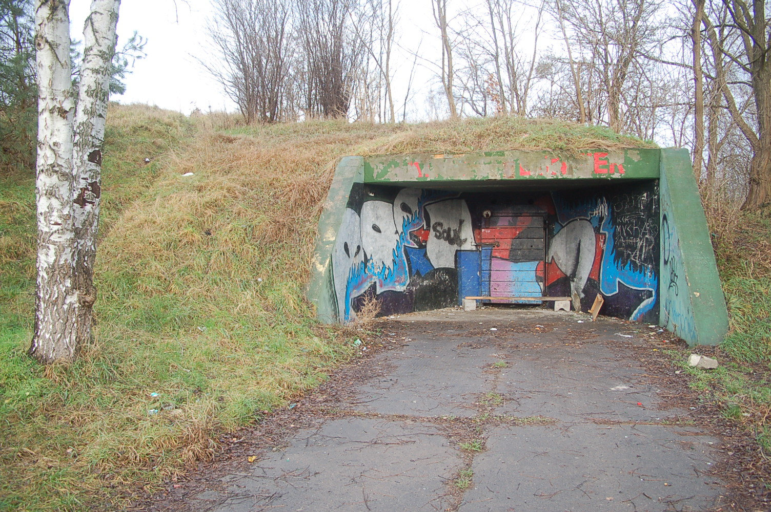 Wejście główne do poradzieckiego zapasowego schronu dowodzenia (2014)